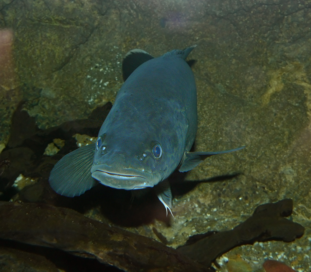 Murray cod